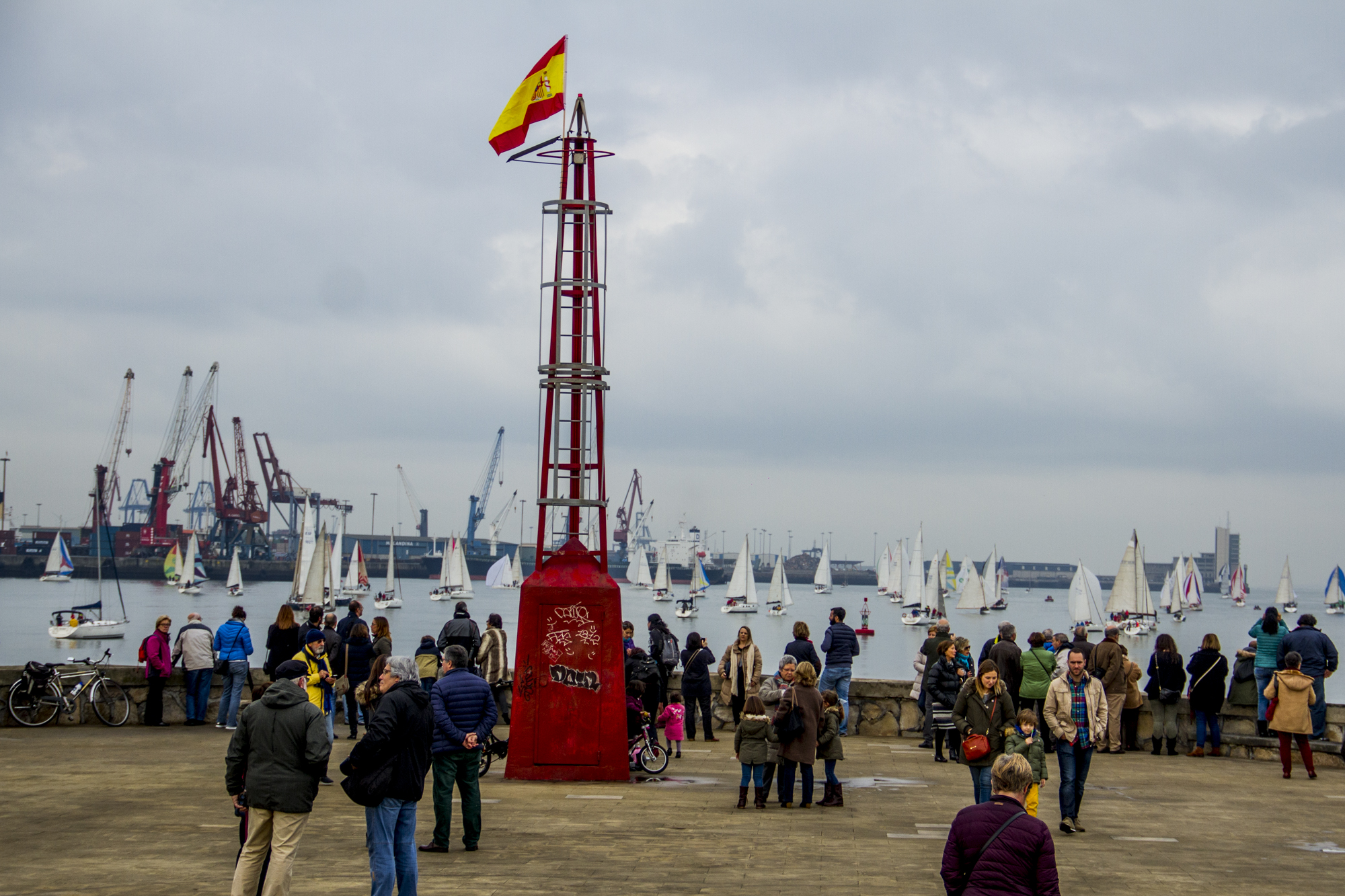 Regata del Gallo desde Las Arenas